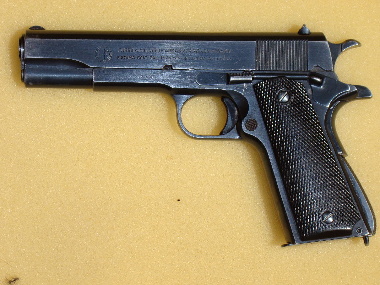 Fm Rosarina cal 45 ACP